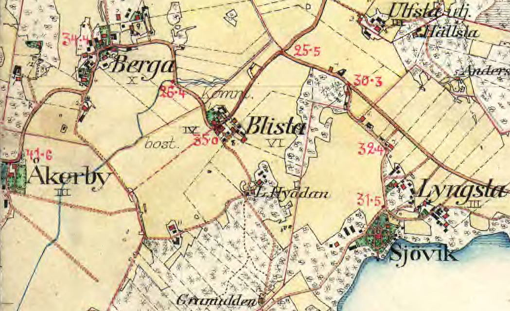 Byarna Åkerby, Berga, Blista, Sjövik och Lyngsta